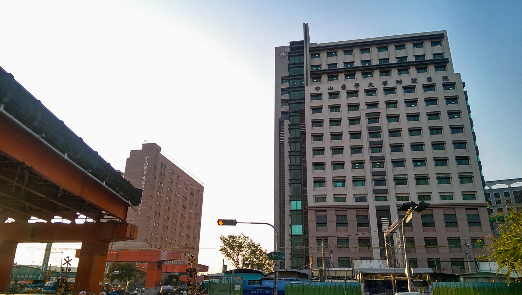 中文（台灣）: 文心路橋拆除工程與中山附醫